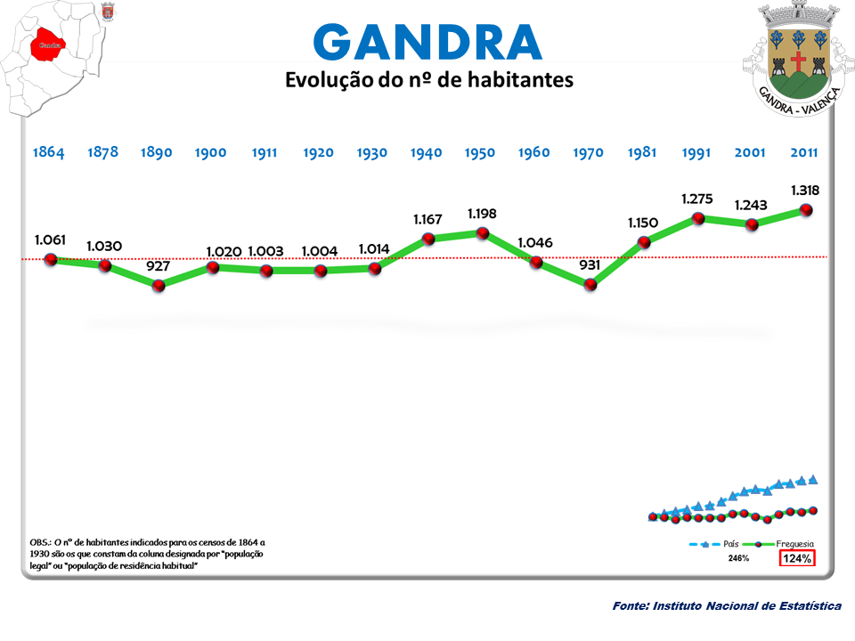 Censos 1864/2011